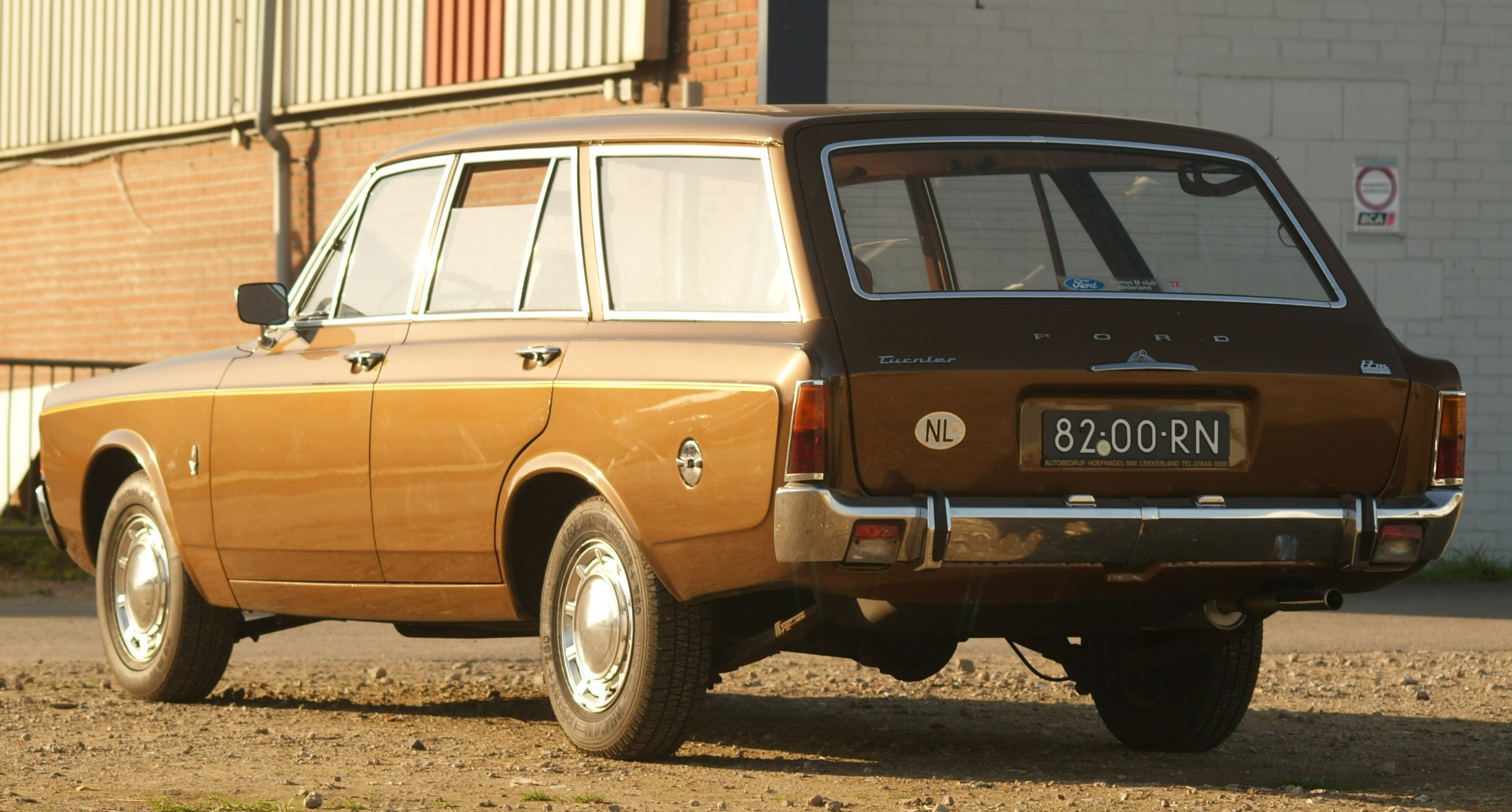 82-00-RN Ford Onderdelendag, Barneveld